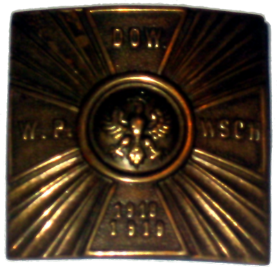 Odznaka Pamiątkowa Dowództwa Wojsk Polskich Wschodnich 1918-1919